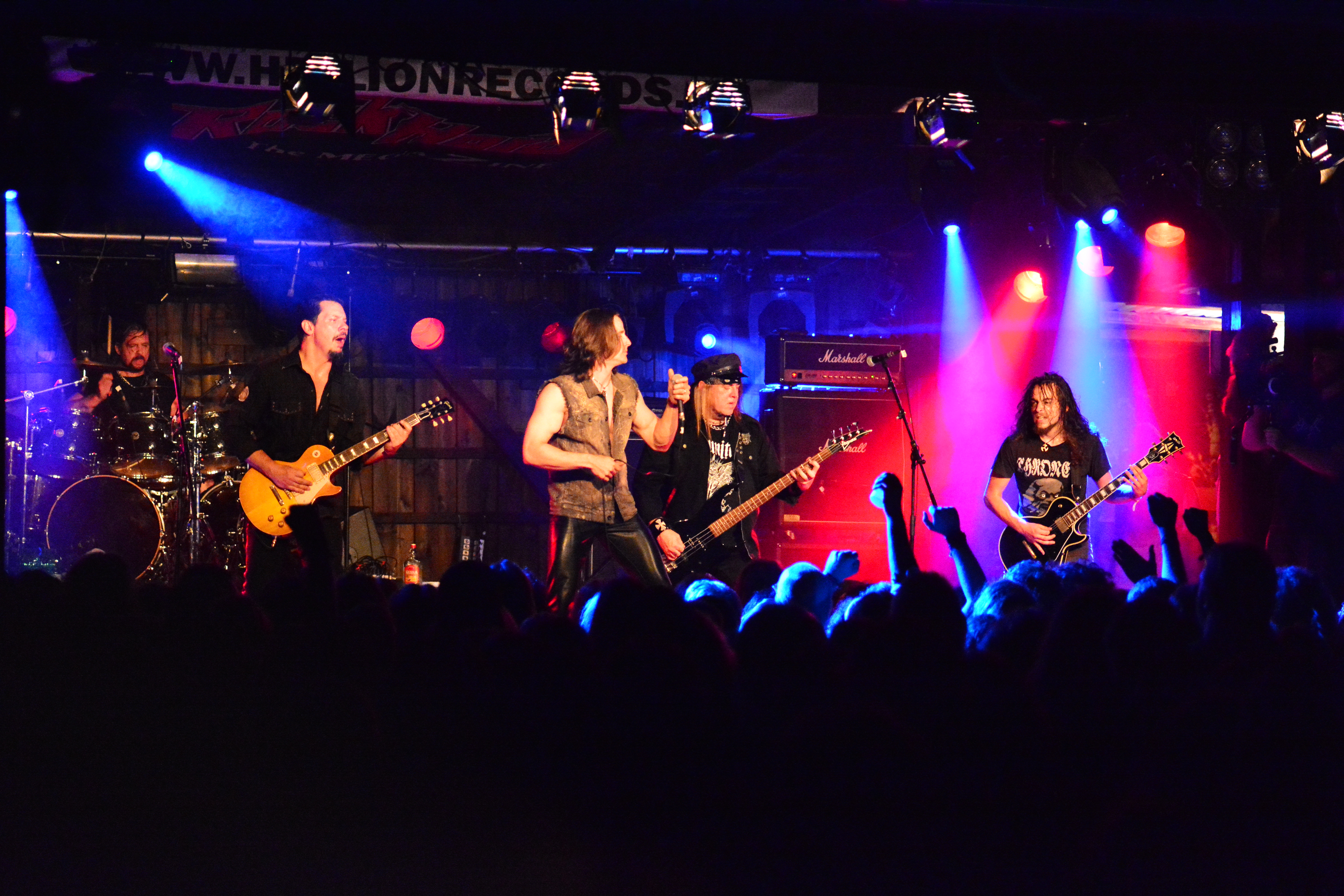 Riot V beim Headbangers Open Air 2014